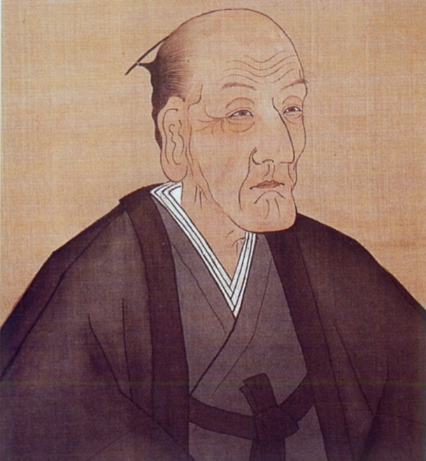 上杉鷹山。Uesugi Youzan.